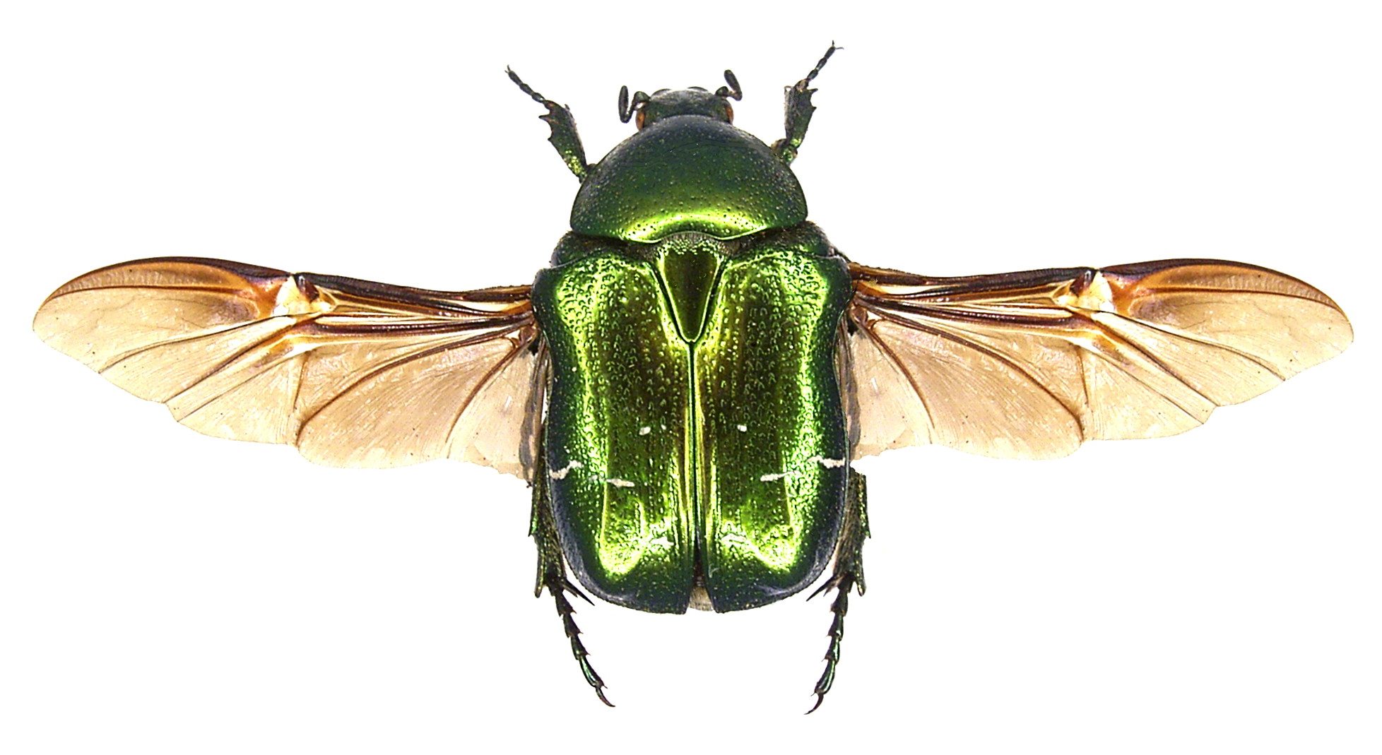 Familie: Scarabaeidae Grösse: 14-20 mm Verbreitung: ganz Europa ohne Iberische Halbinsel Ökologie: Entwicklung im morschen Holz von Laubbäumen und in Humuserde Fundort: Korsika leg. det. U.Schmidt, 1973 Foto: U.Schmidt, 2006